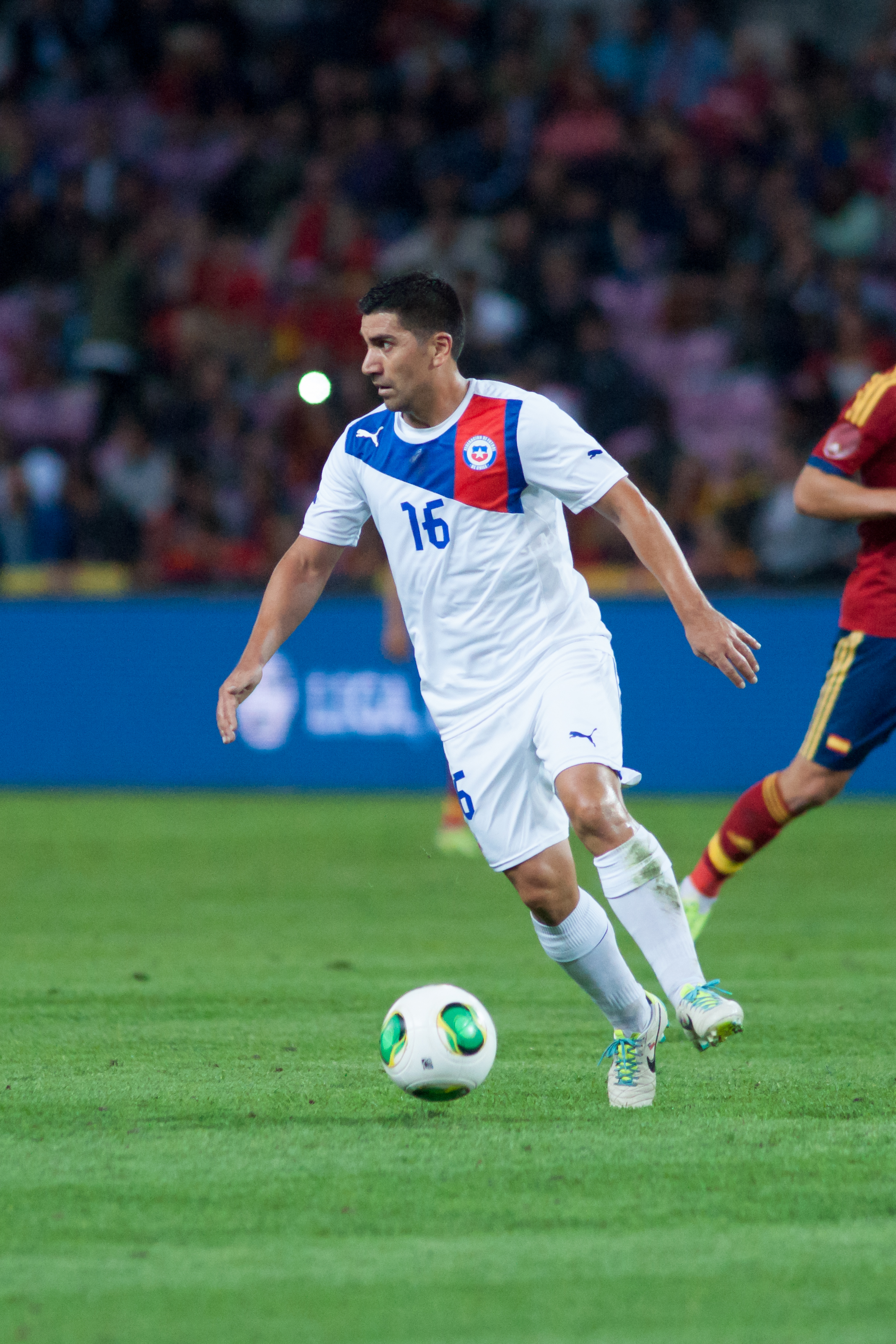 Espagne - Chili, 10 septembre 2013.